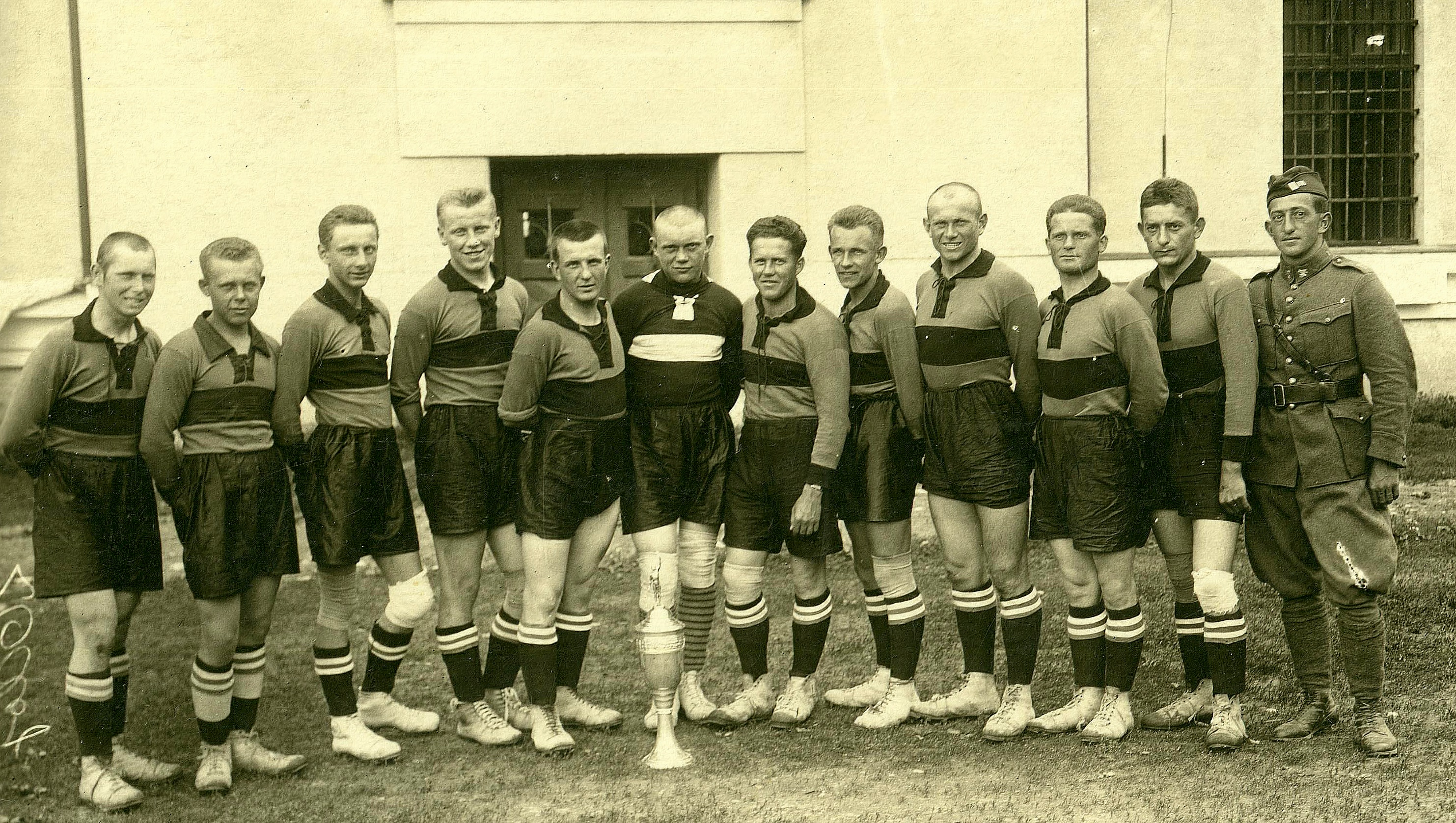 fotbalová 11 důstojníků hraničářského praporu ve Fryštátě 1930